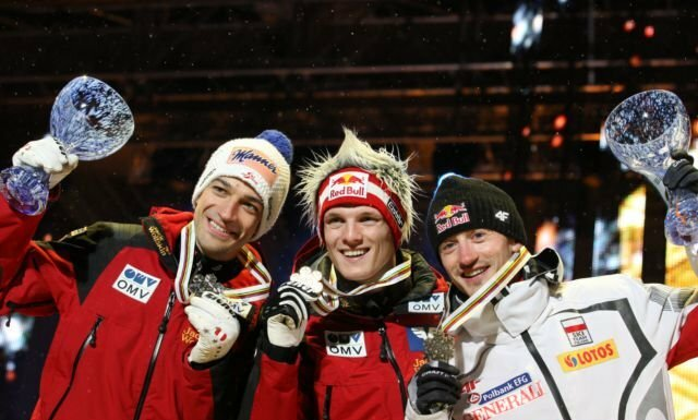 Andreas Kofler, Thomas Morgenstern i Adam Małysz podczas ceremonii medalowej po konkursie indywidualnym na skoczni normalnej w ramach Mistrzostw Świata w Narciarstwie Klasycznym 2011 w Oslo.